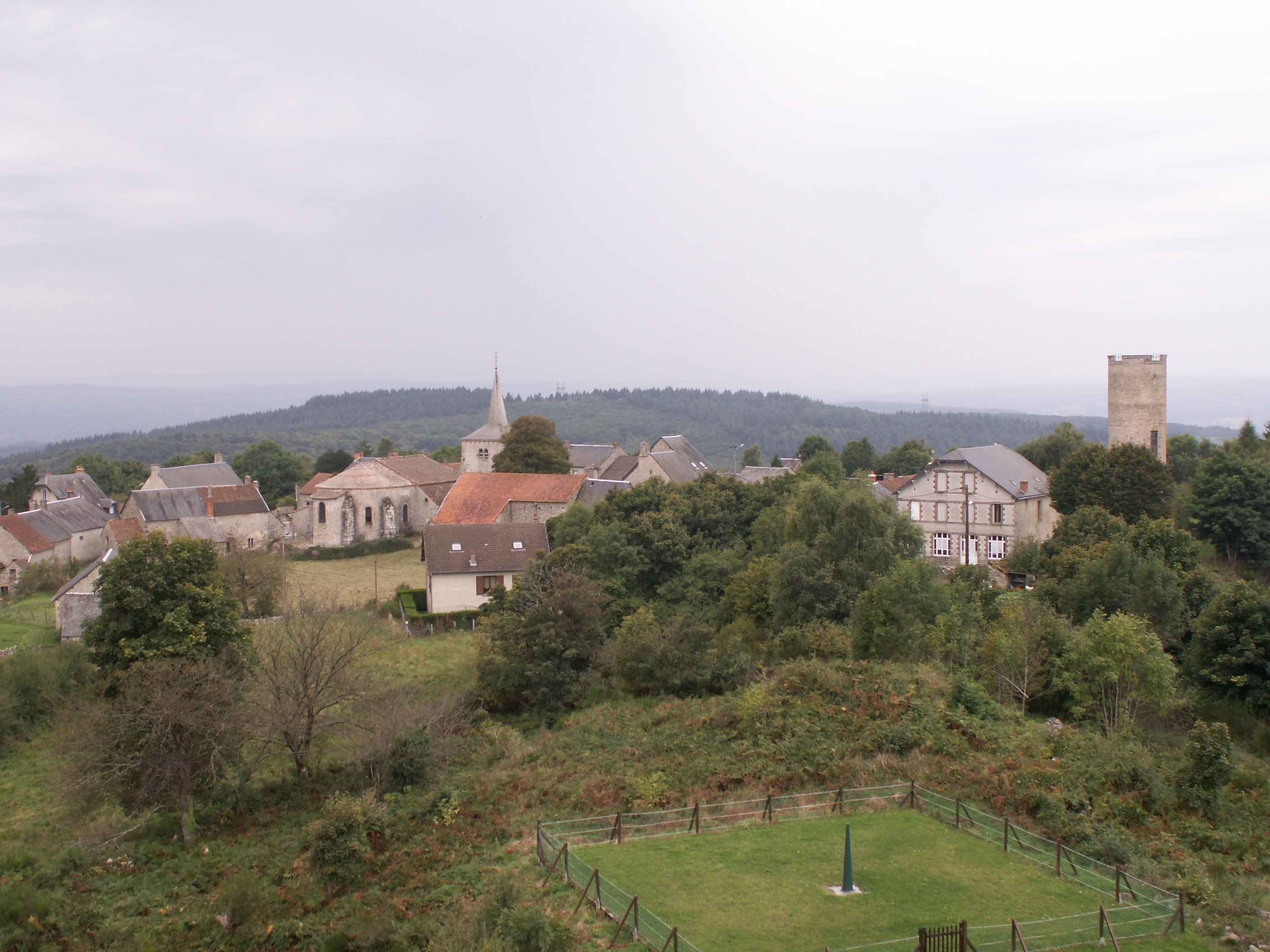 Antenne sismique de Toulx Sainte Croix